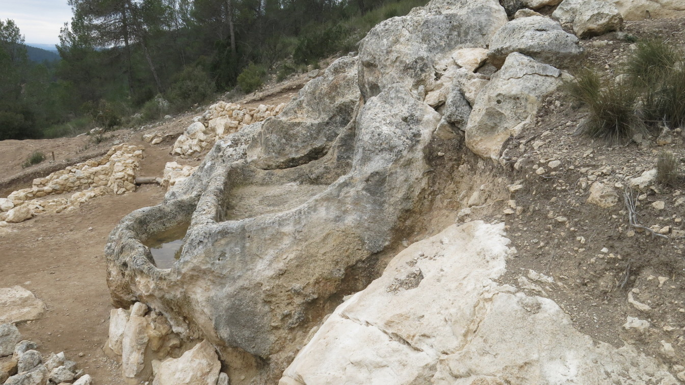 Bassa de la Solana de las Pilillas (època ibera, segle V abans de Crist), excavada en la roca per a l'elaboració de vi i oli, situada en Los Duques, pedania del municipi valencià de Requena.